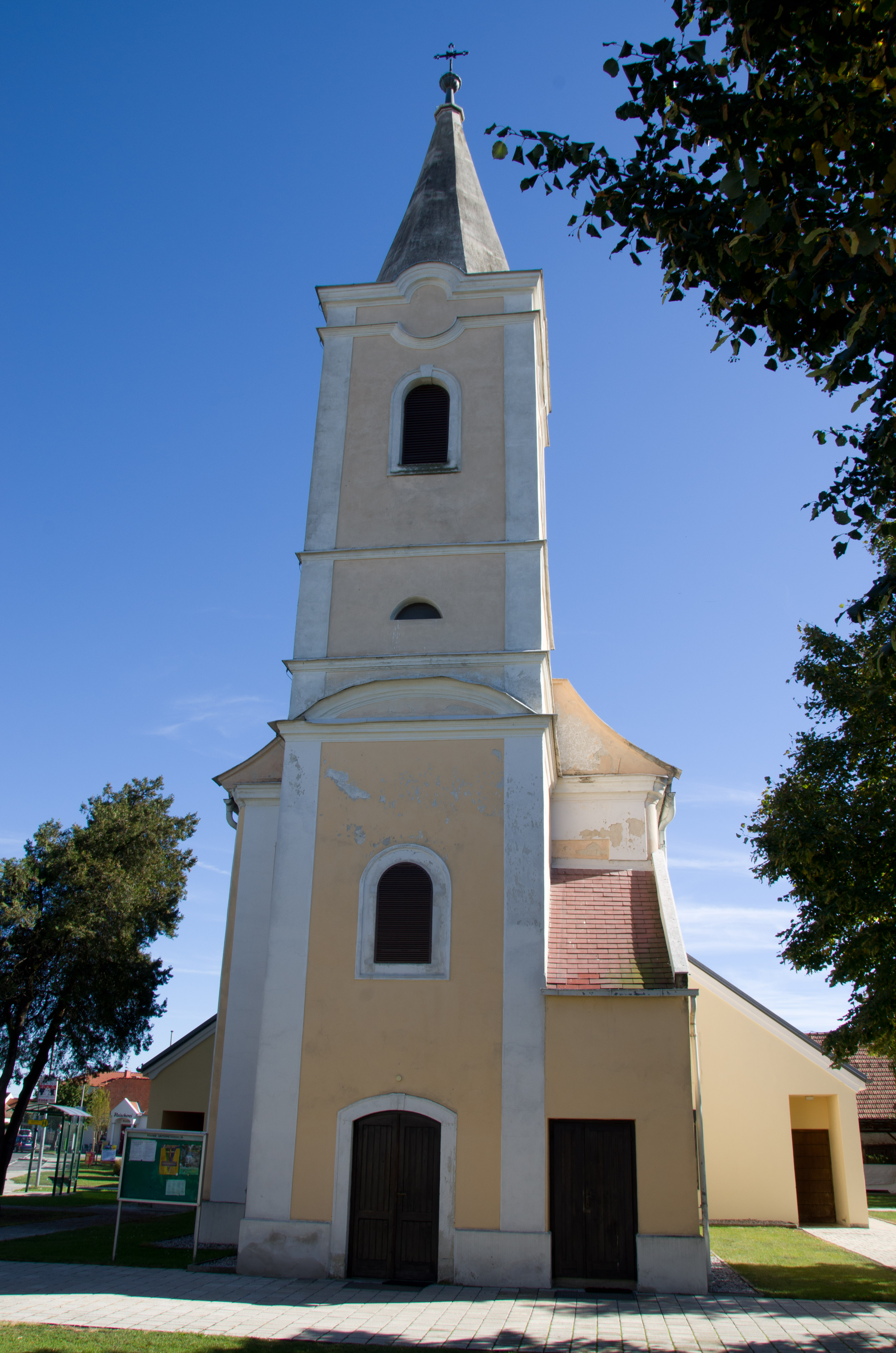 Kath. Pfarrkirche hl. Rosalia